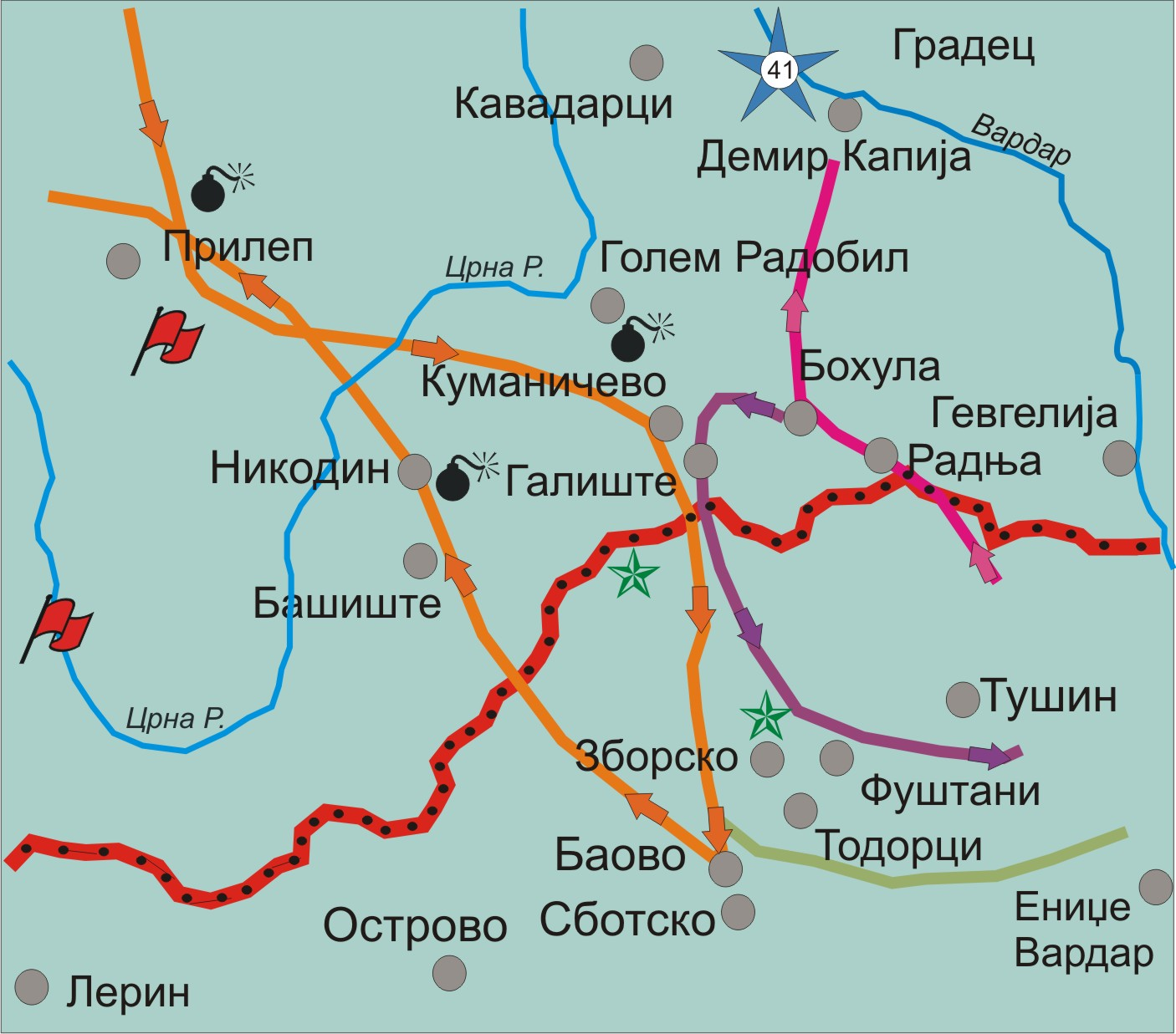 Движења на единиците за време на Февруарскиот поход